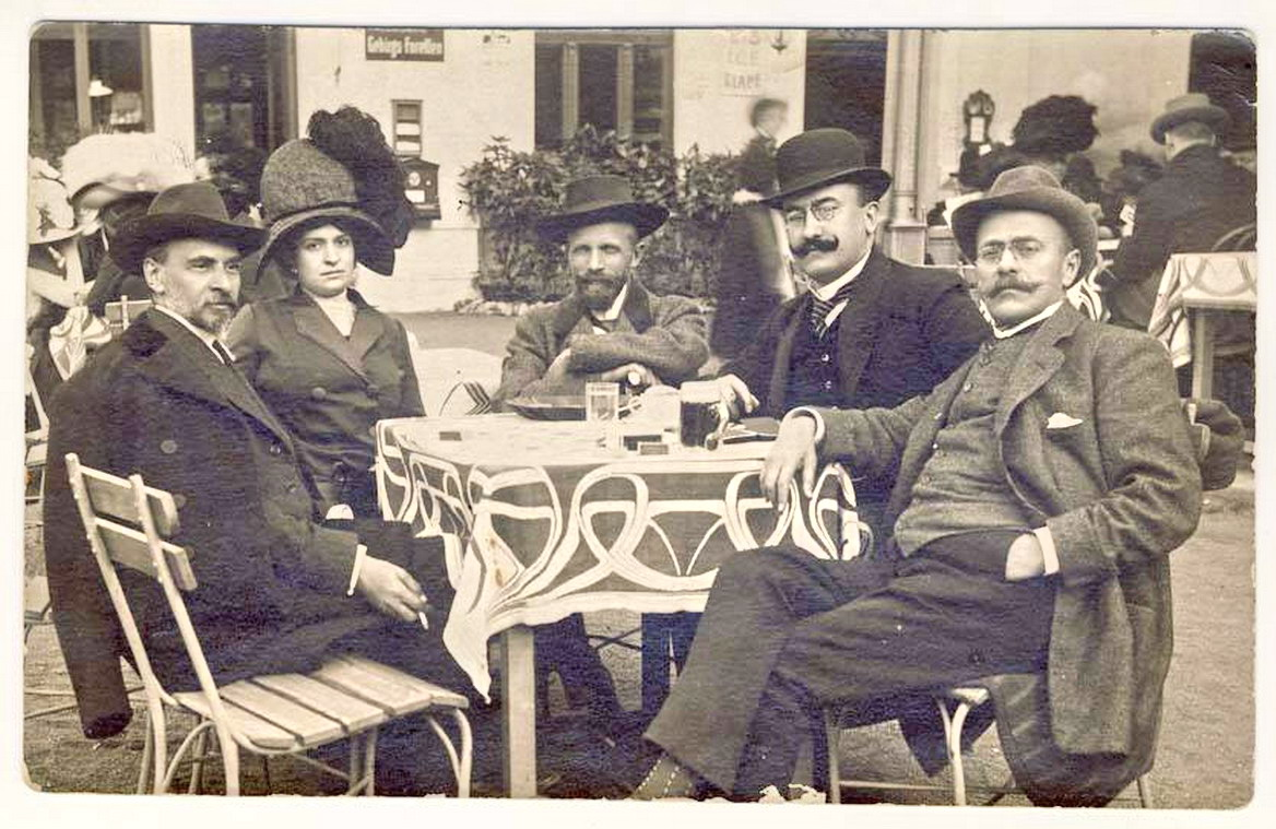 Într-o companie chic. Acum 101 ani, cu nenea Iancu cel cool şi domnul Coşbuc cel elegant, într-o zi rece, dar cu soare, la terasa, la privit lucrurile…de departe. "Voieşti să cunoşti lucrurile? Priveşte-le de aproape. Vrei să-ţi placă? Priveşte-le de departe", Ion Luca Caragiale. De la stânga spre dreapta: George Coşbuc – d-na Vaida-Voievod – dr. Ciuta (Bistriţa) – Alexandru Vaida-Voievod – I.L.Caragiale (Karlsbad, 1911)